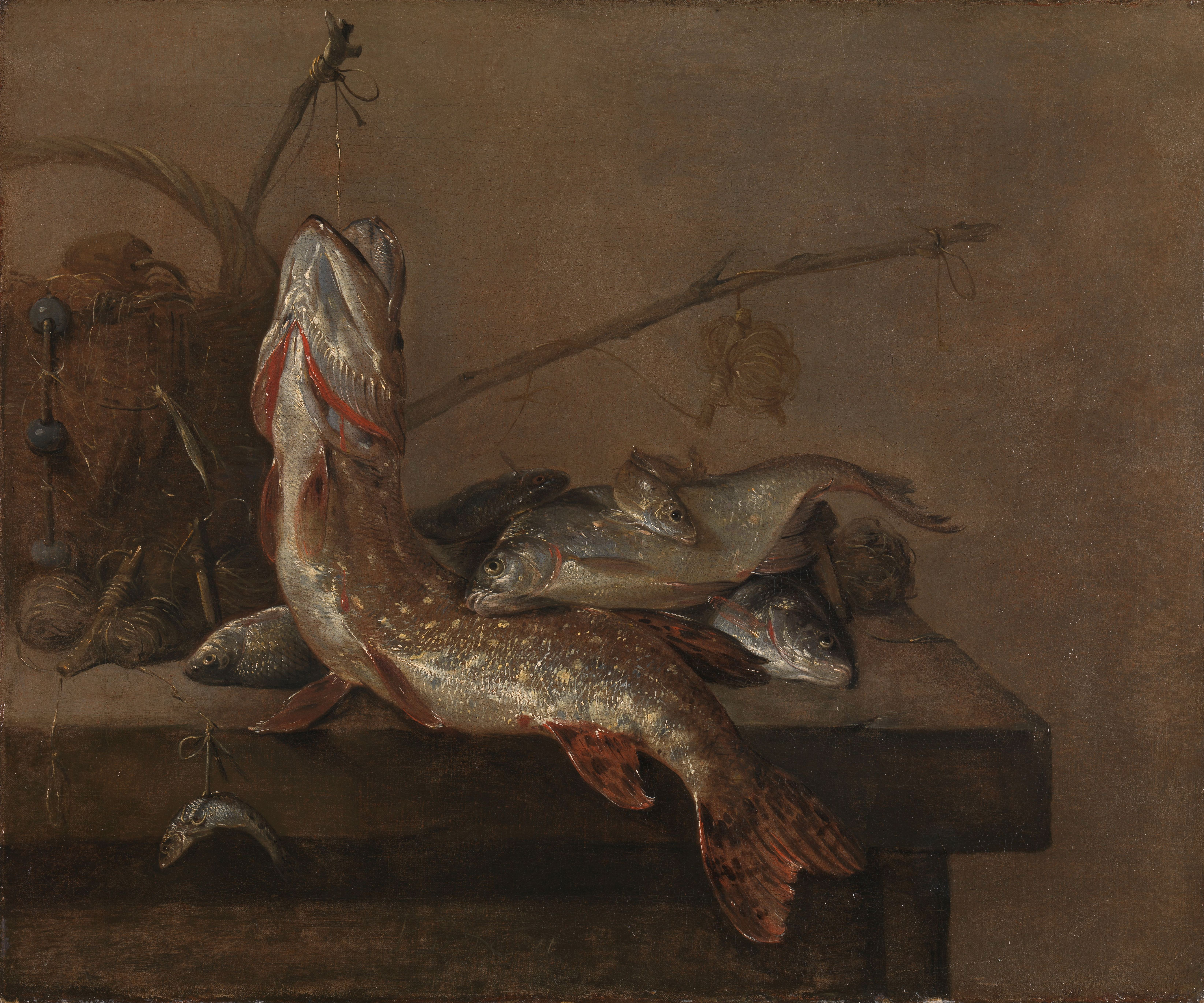 Visstilleven. Stilleven met verschillende soorten vis (vorens, kabeljauw?) uitgestald op een tafel. Links een mand met klossen lijn en een vis als aas aan een lijn. Op de achtergrond een stok met lijn als hengel.